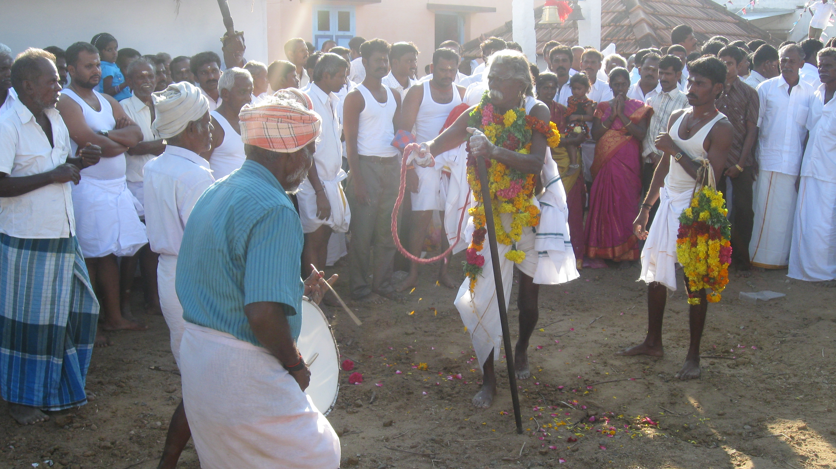 தாள வாத்தியங்களுக்கேற்ப அருள்நிலையில் சாமியாடும் சாமியாடி